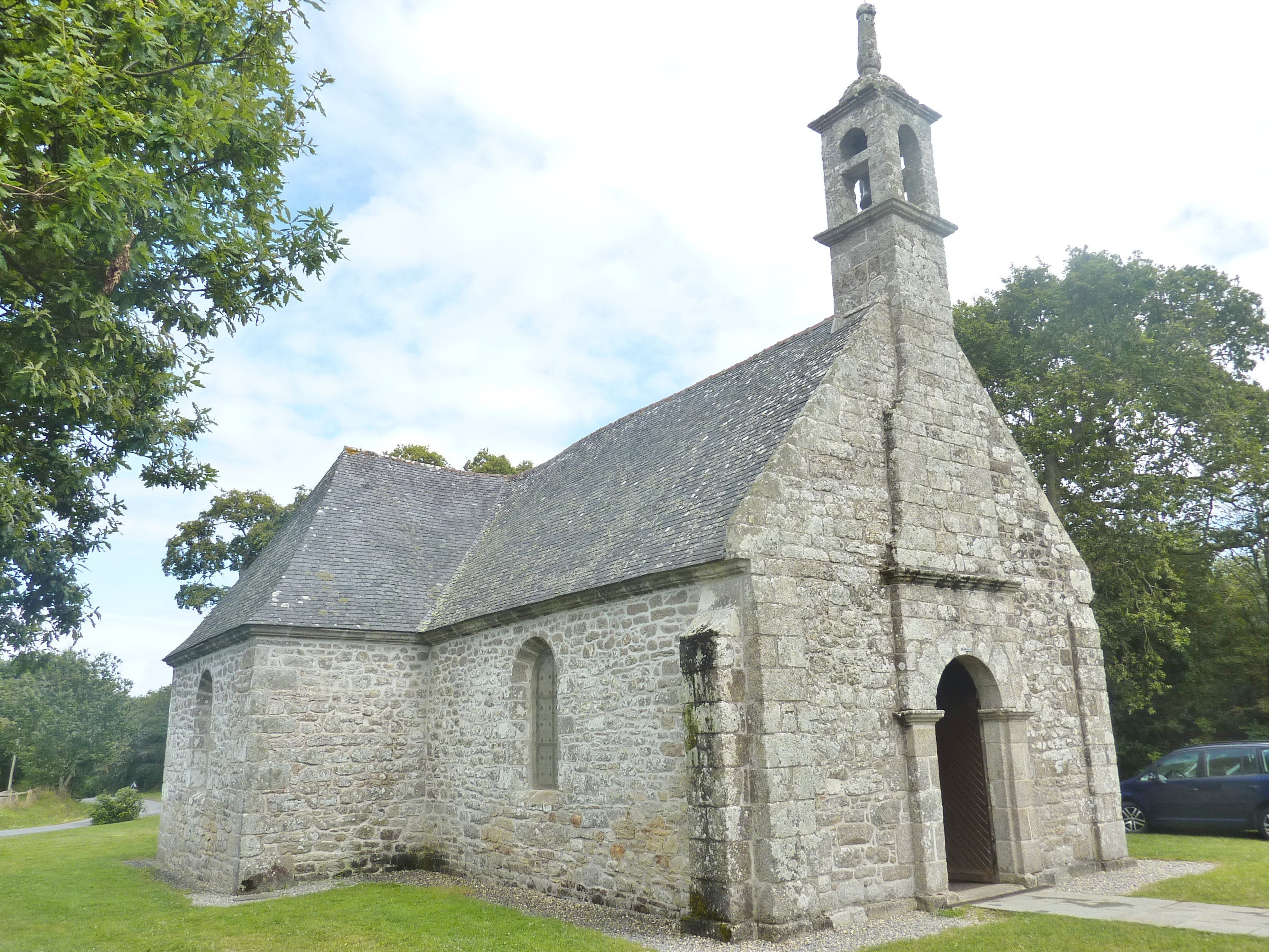 Fouesnant : la chapelle Notre-Dame-des-Neiges de Kerbader, vue extérieure d'ensemble